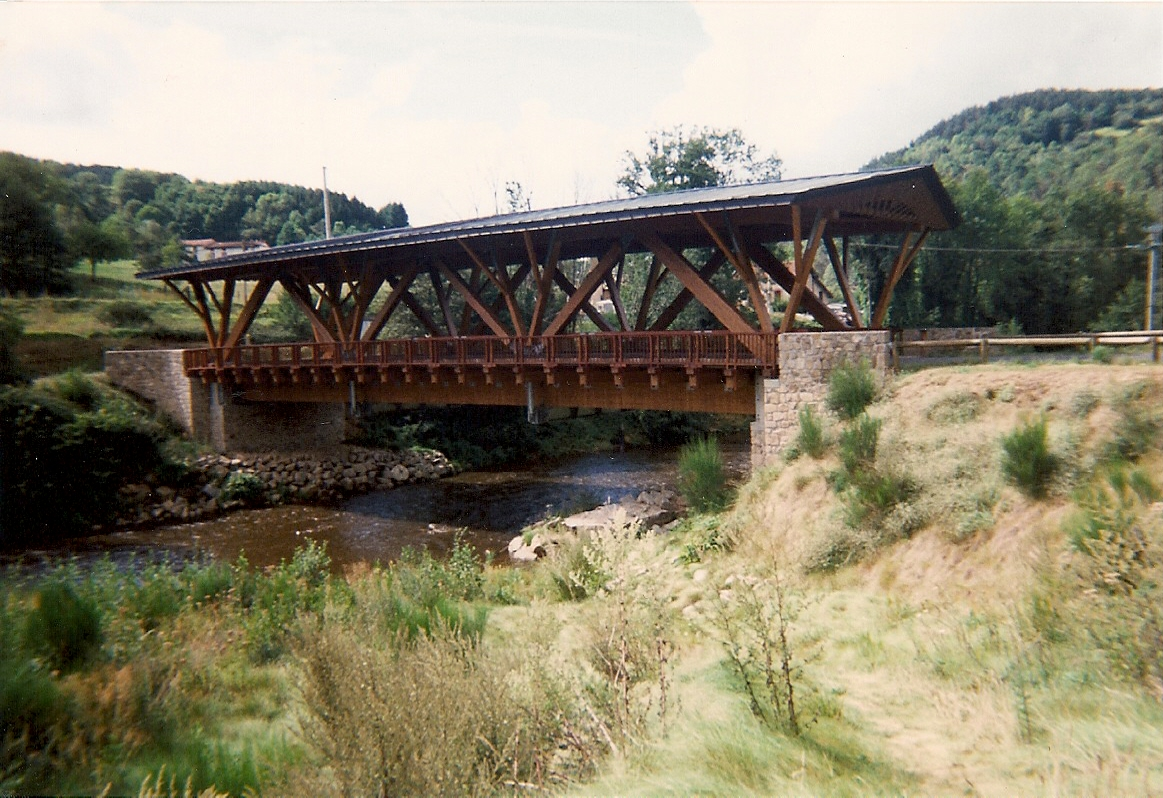 Photo du pont sur la Dore qui mène à la ville de Saint-Gervais-sous-Meymont.